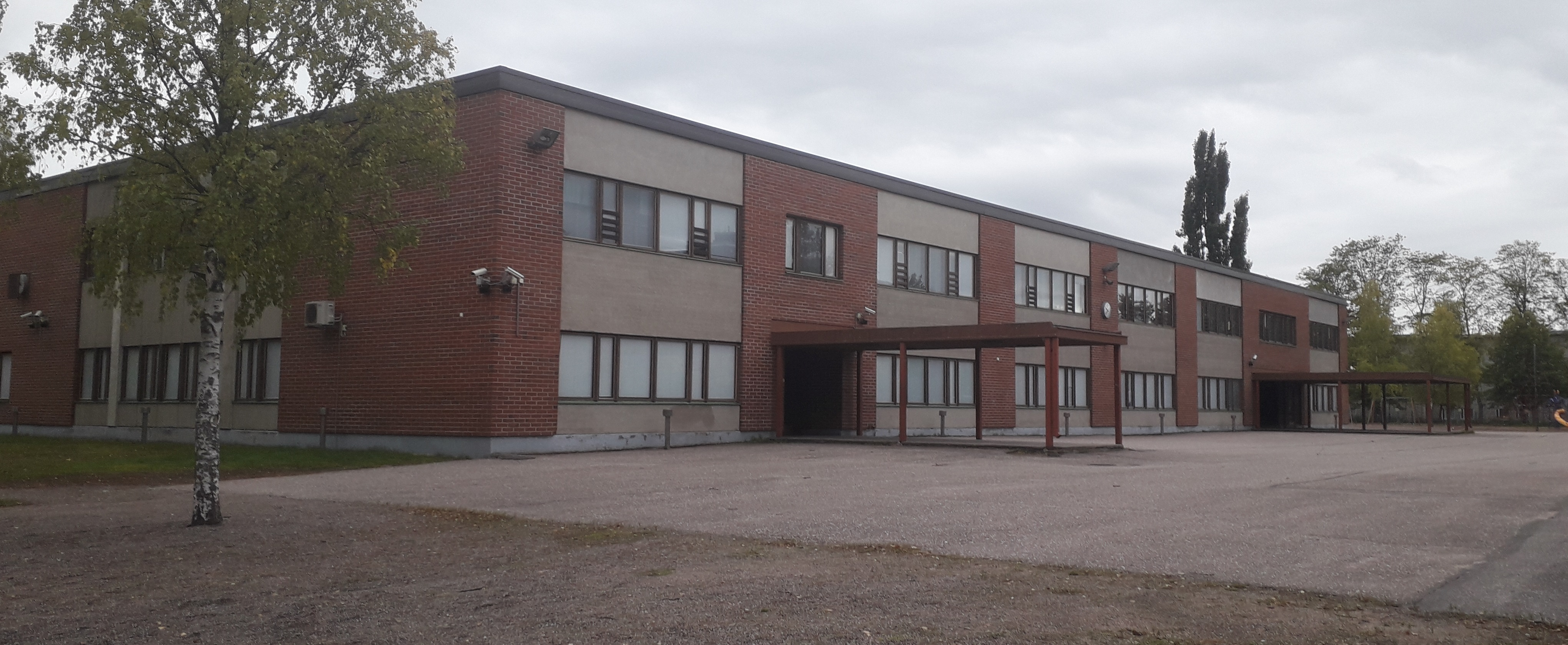 Riihimäellä sijaitseva Peltosaaren koulu syyskuussa 2019.